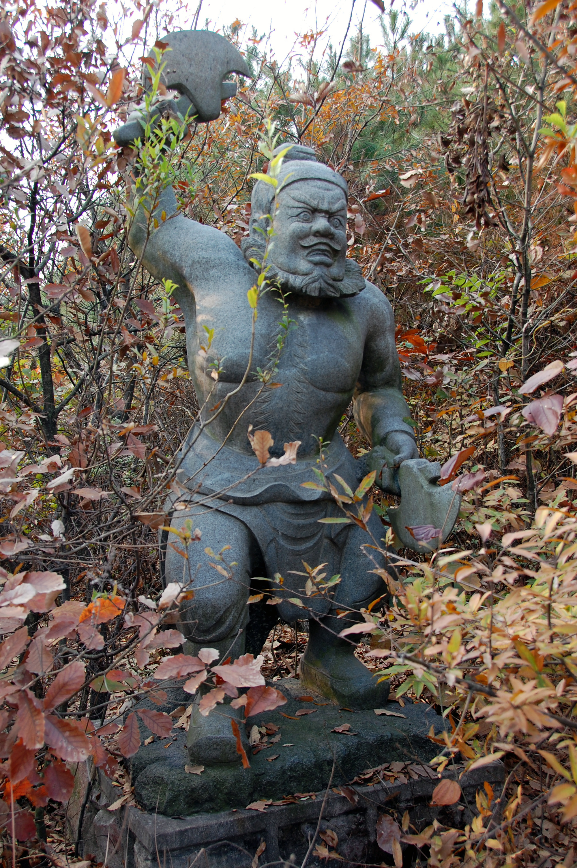 清明上河図/清明上河图